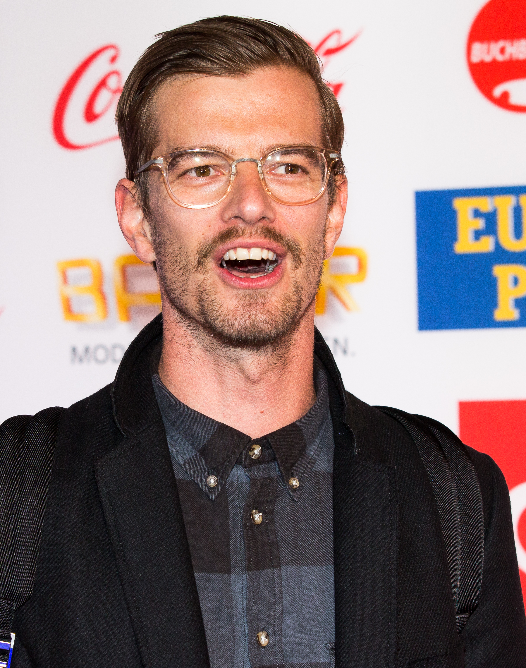 during Radio Regenbogen Award 2017 at Europapark, Rust, Baden-Württemberg, Germany on 2017-04-07, Photo: Sven Mandel